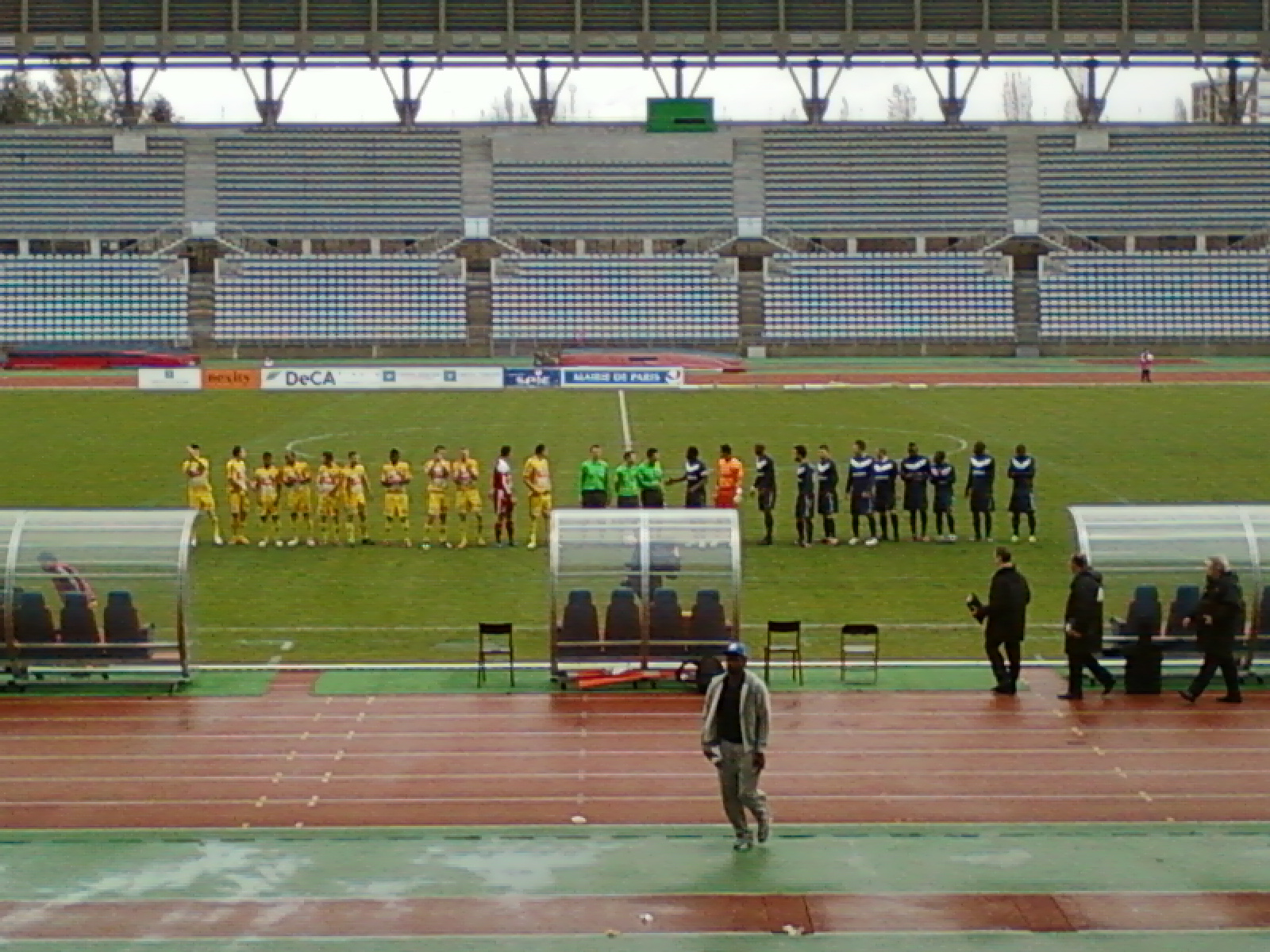 Présentation des équipes lors du match Paris FC - Orléans du 22 avril 2012 au stade Charléty